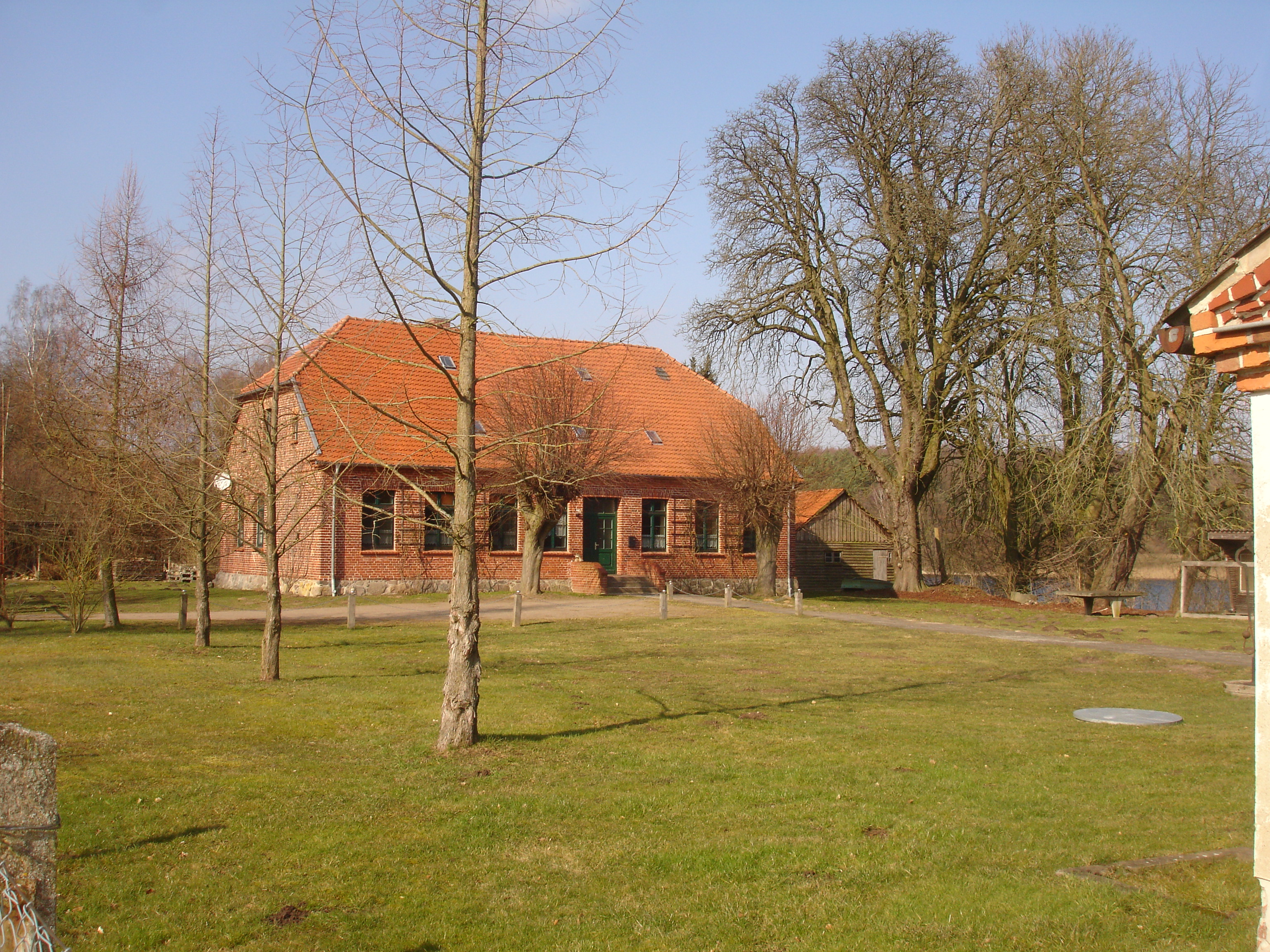 Ehemaliges Forsthaus Lähnwitz im Sternberger Seengebiet, Mecklenburg